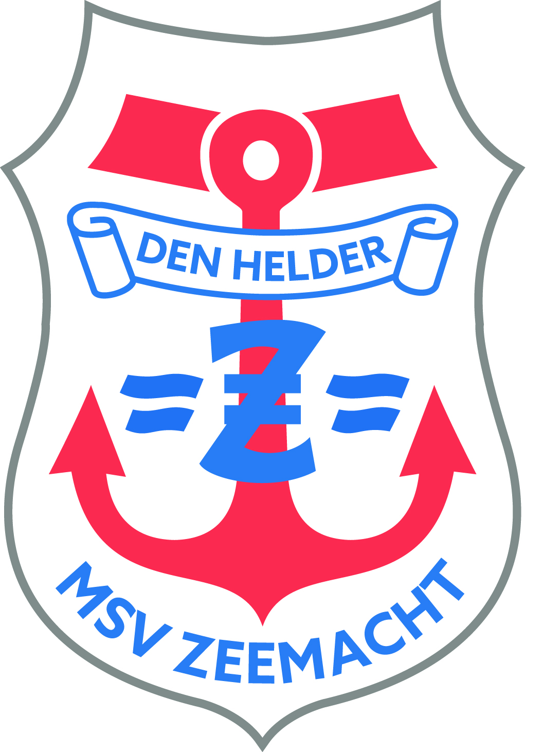 Logo van de sportclub Zeemacht uit Den Helder